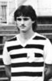 Title: Mannschaftsfoto FC Carl Zeiss Jena Factual corrections and alternative descriptions are encouraged separately from the original description. Additionally errors can be reported at this page to inform the Bundesarchiv. Original historic description: ADN-ZB-Kasper-2.9.82-zin-Bez. Gera: Fußball-UEFA-Cup-Teilnehmer der DDR vorgestellt: FC Carl Zeiss Jena. Die Mannschaft aus der Saalestadt ist einer der drei Vertreter des DFV der DDR im UEFA Cup 1982-83. Die Elf trifft in der ersten Runde am 15.9. (in Jena) und 29.9. (in Bordeaux) auf die französische Mannschaft von Girendins Bordeaux. Hintere Reihe v.l.n.r.: Stefan Meixner, Ullrich Oevermann, Jürgen Raab, Rüdiger Schnuphase, Torhüter Hans-Ullrich Grapenthin, Torhüter Thomas Runkewitz, Andreas Bielau, Norbert Kahnt, Gerhard Hoppe und Thomas Ludwig. Vordere Reihe v.l.n.r.: Mannschaftskapitän Lothar Kurbjuweit, Martin Trocha, Matthias Kaiser, konrad Weise, Andreas Krause, Jörg Burow, Uwe Pohl, Fred Steinborn und Wolfgang Schilling.